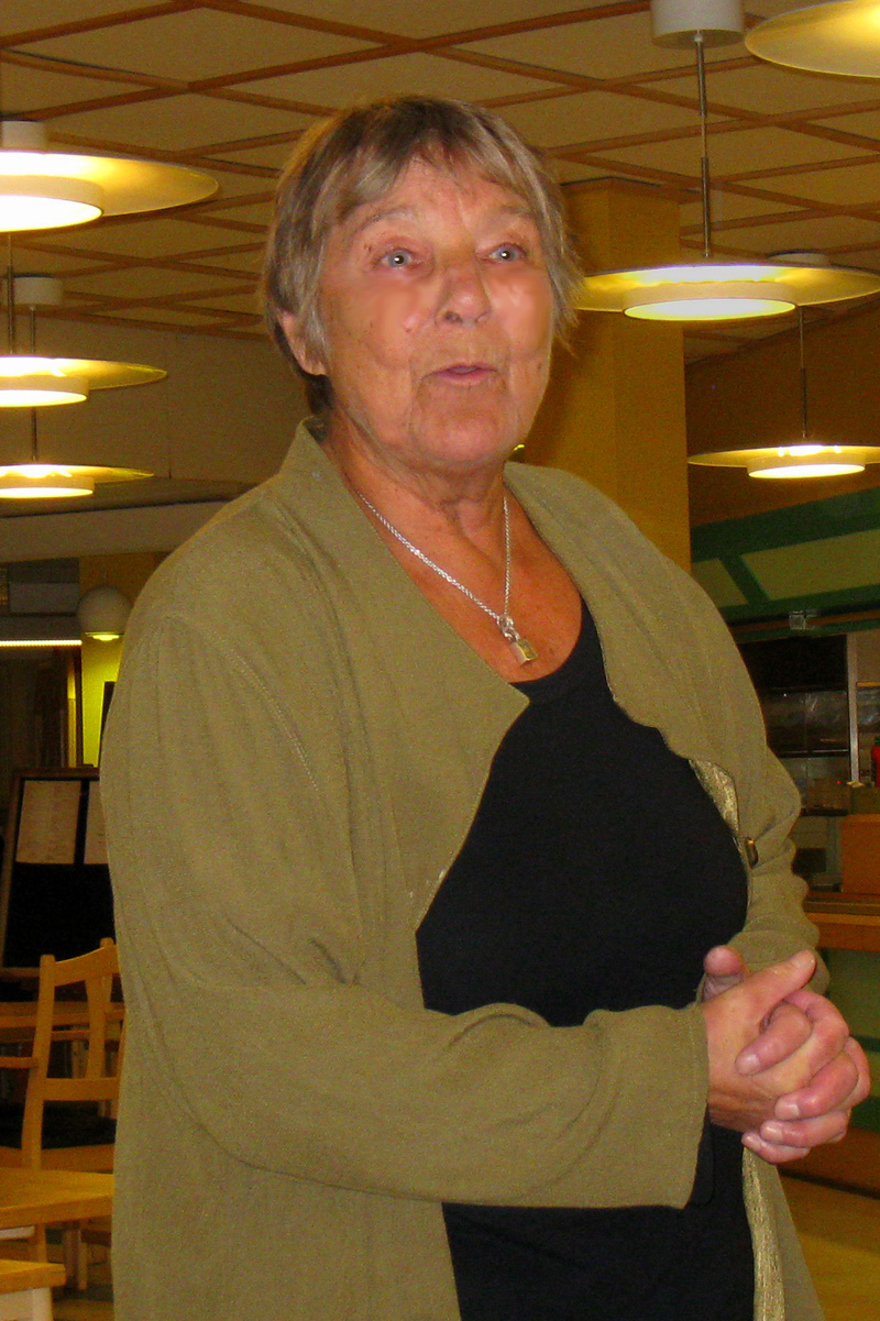 Maria Hörnelius uppträder i Bergsjön, Göteborg. Oktober 2014.